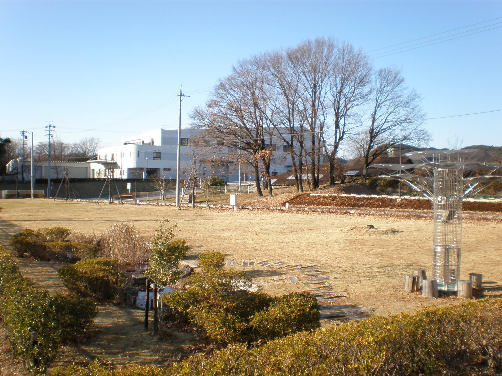 愛知県小牧市にあるリサイクル関連施設にある広場